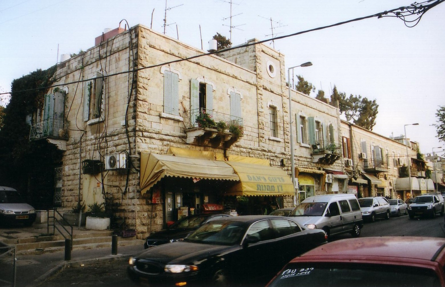 Bethlehem Rd., Jerusalem